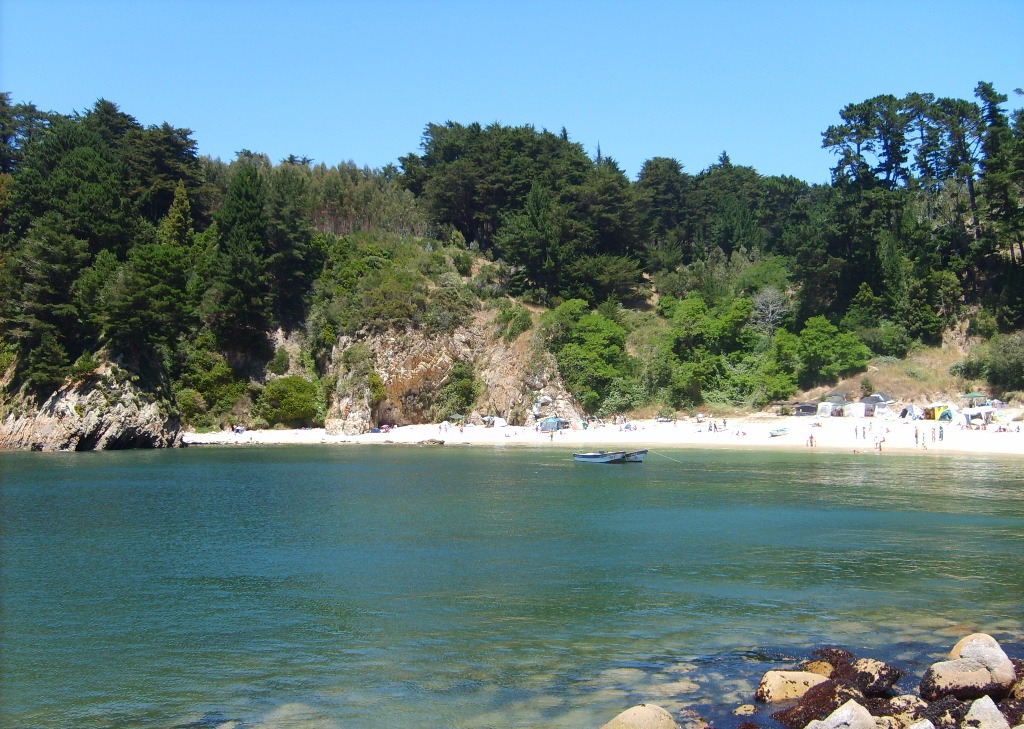 Playa de Ramuntcho, cerca de Talcahuano Chile